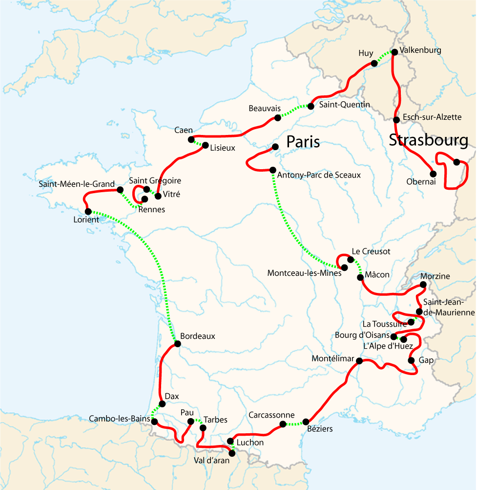 Tour de France 2005